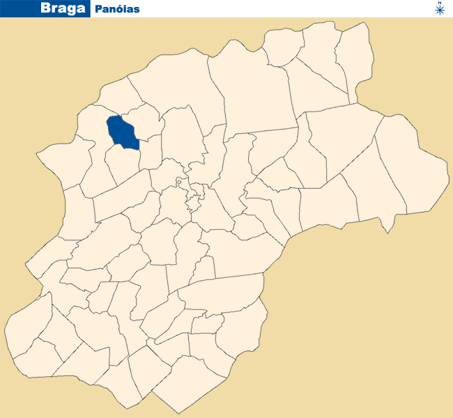 Localização de Panóias no concelho de Braga.